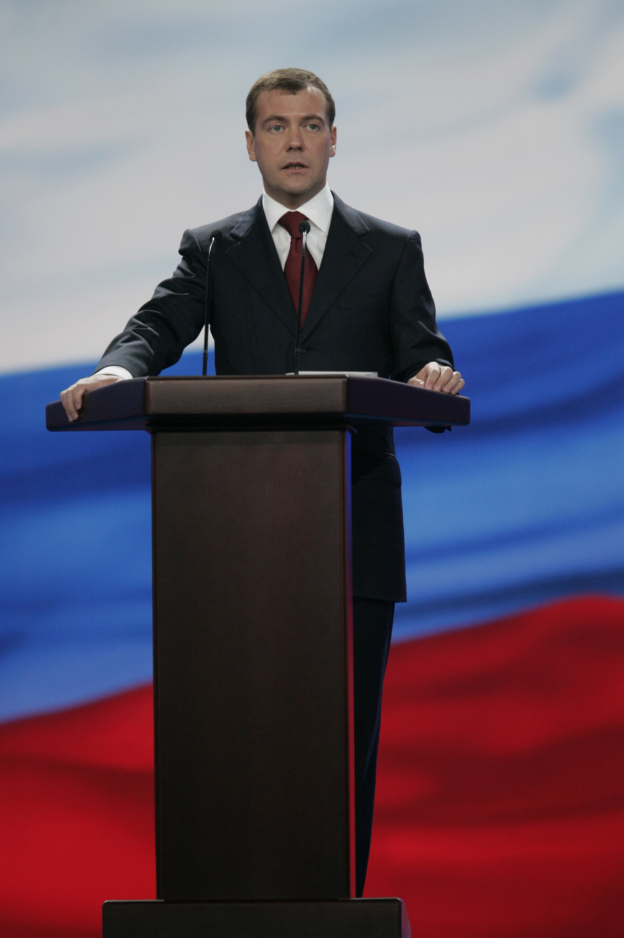 Dmitry Medvedev